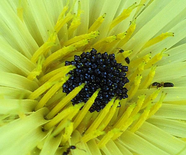 Weichhaariges Schwefelkörbchen